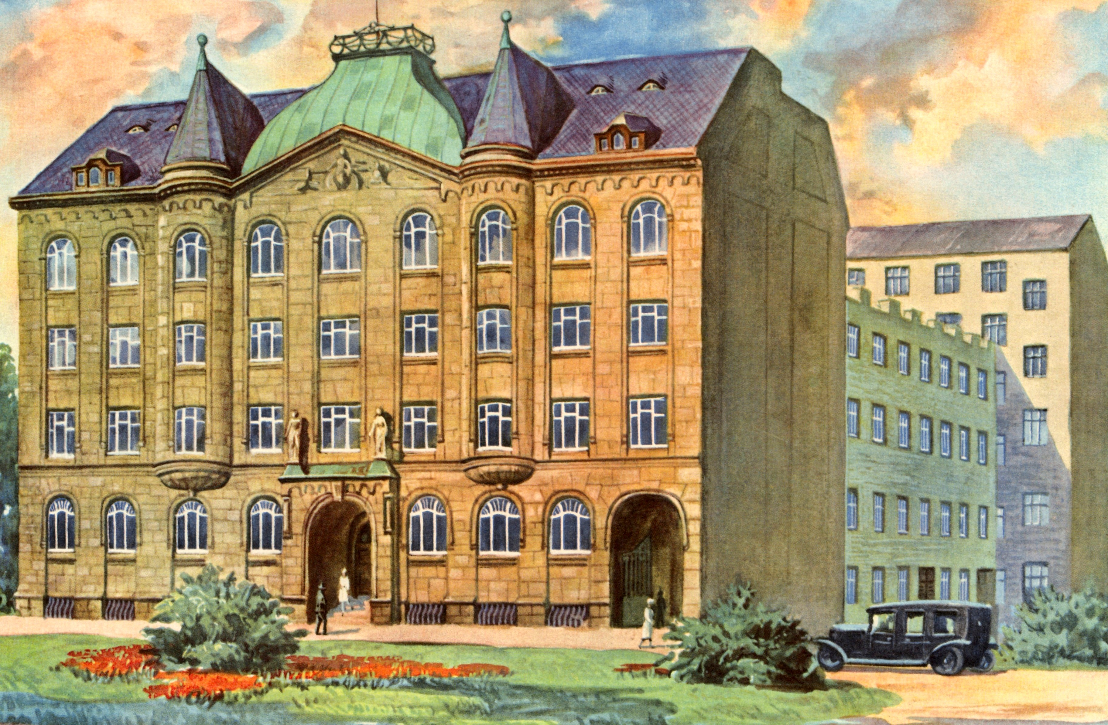 Die Zentrale der GEG und des Zentralverbandes der Konsumgenossenschaften um etwa. 1905